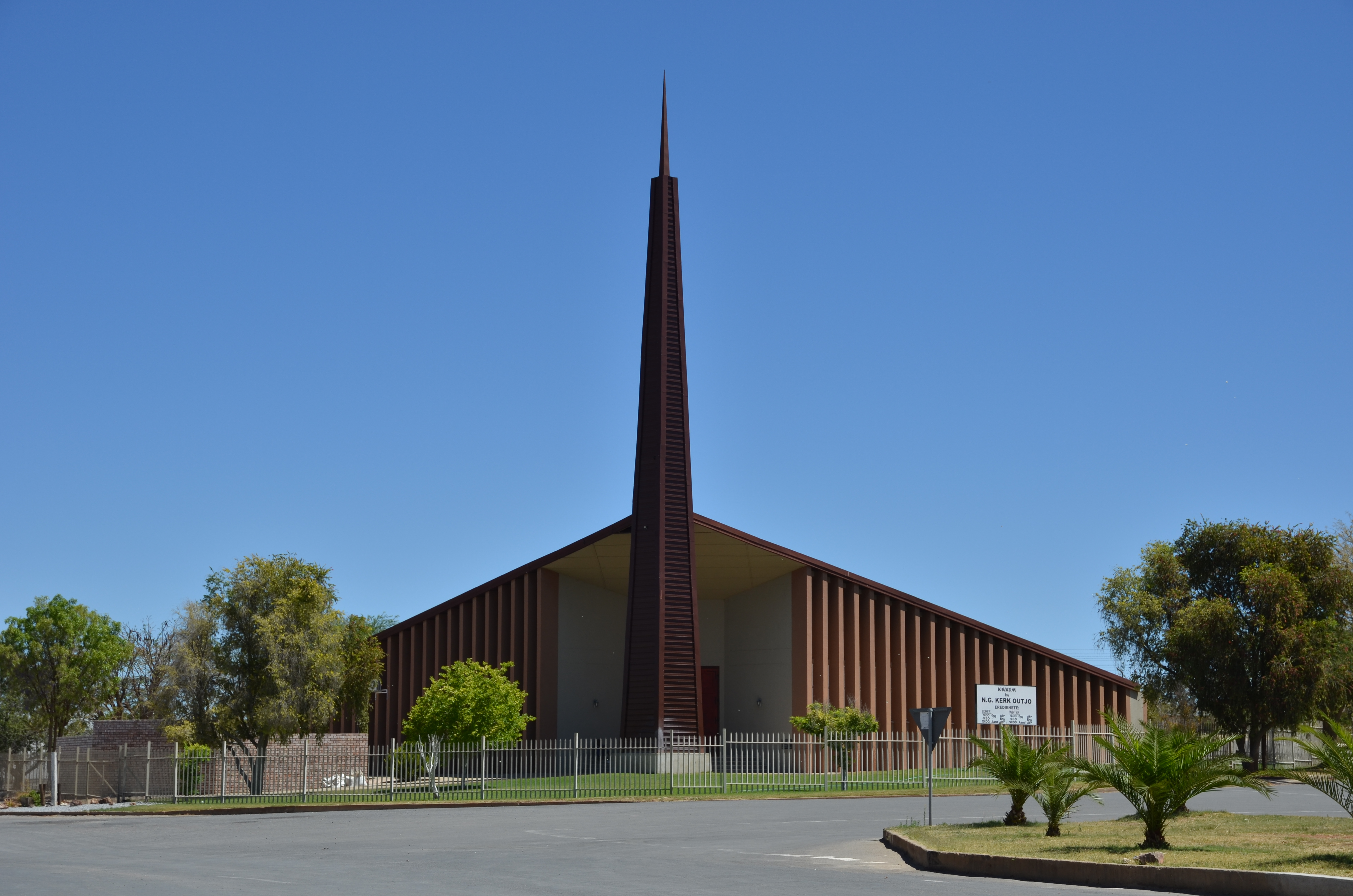 Outjo, kostel - Namibie